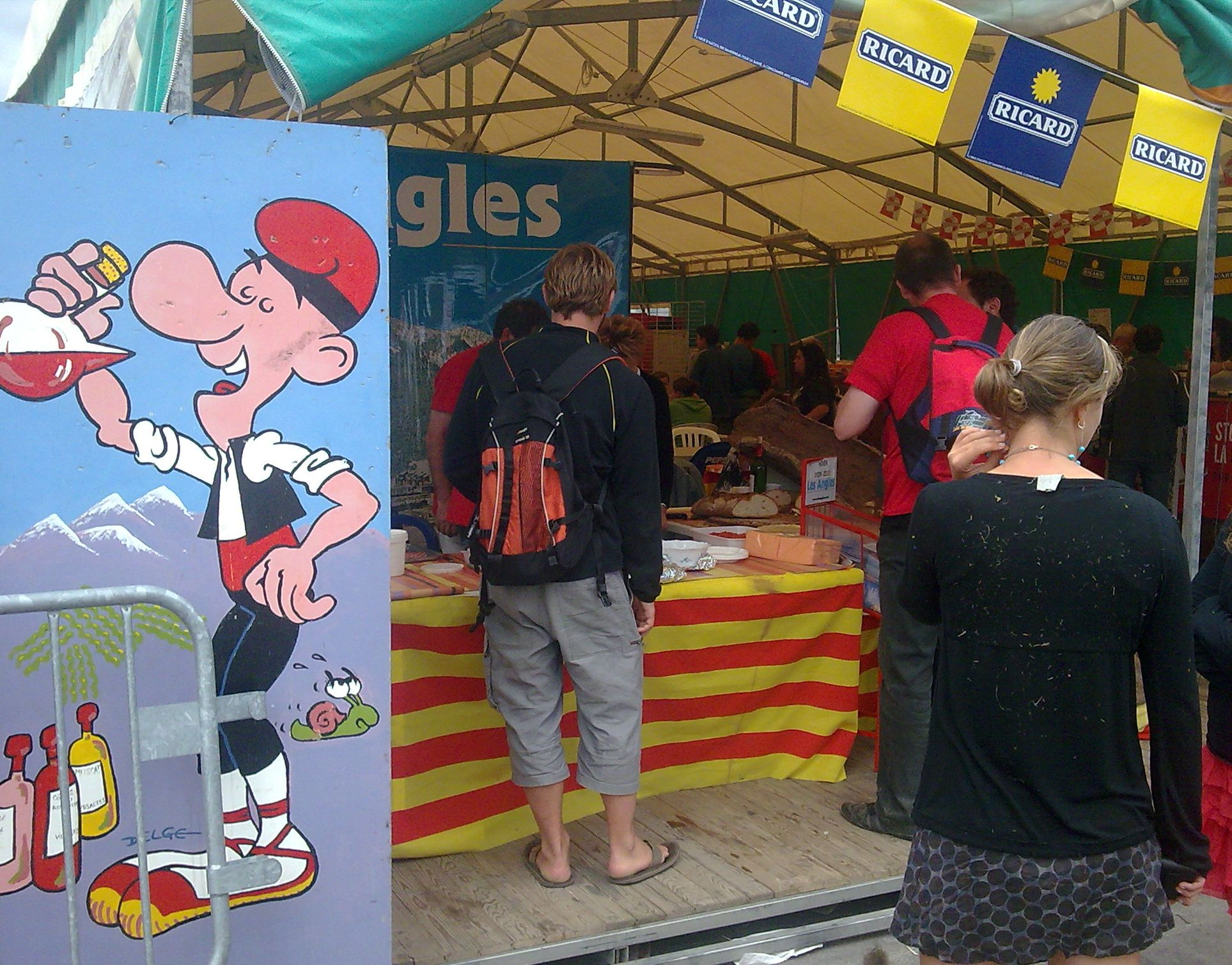 Detall de la carpa de la Catalunya Nord a la festa de l'Huma de París el 2009. S'observa el panell de cada any amb un català amb espardenyes, faixa i barretina bebent d'un porró (a l'altre banda hi ha un altre panell amb una pubilla, que no surt a la foto). Al terra hi ha ampolles de vi i un cargol que fuig d'una possible cargolada. Al fons hi ha els Pirineus. A la dreta, una mica més al fons, un petit taller de pa amb tomàquet. La taula està decorada amb la senyera. També hi havia degustacions d'altres productes i plats catalans, exposicions, xerrades, conferències i debats. A més, s'hi podien llegir exemplars del "travailleur catalan".